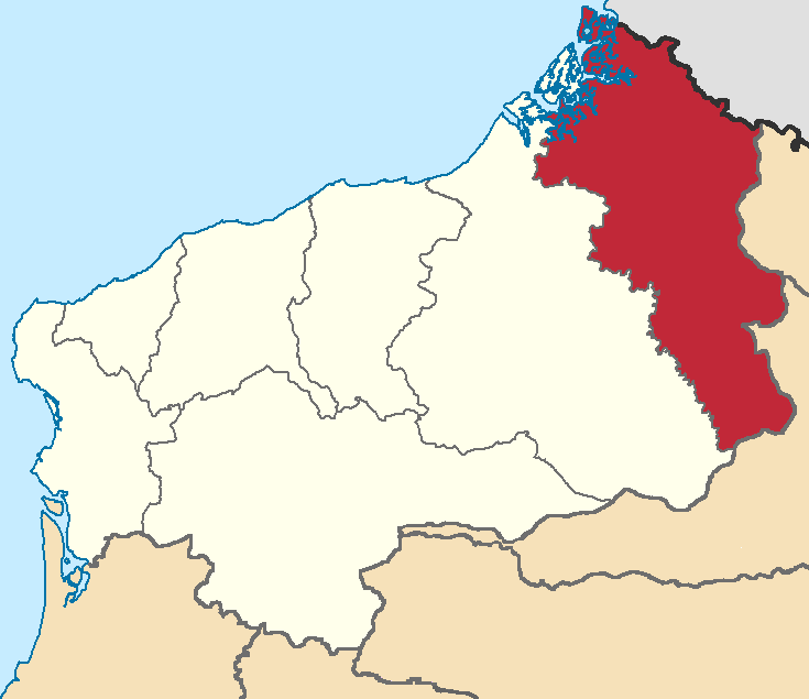 Mapa localizacor del cantón San Lorenzo, Esmeraldas, Ecuador